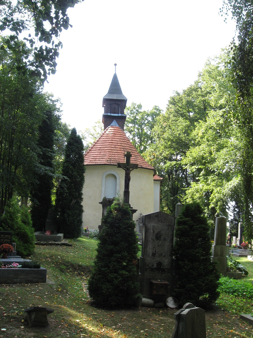 Kostel Božího těla, na hřbitově nad městem, Jílové u Prahy